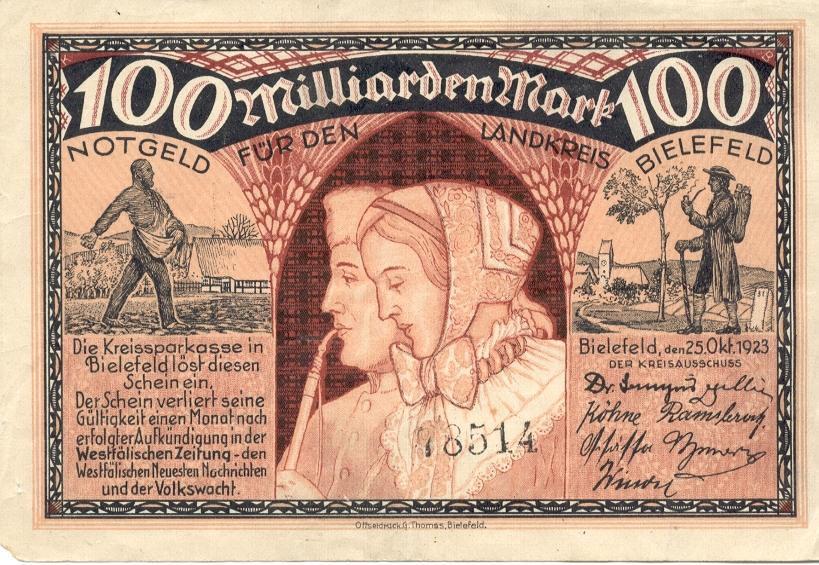 Notgeldschein der Kreissparkasse Bielefeld aus dem Jahr 1923, Papier, gedruckt bei Offsetdruck G. Thomas, Bielefeld, Privatbesitz: Maik Hager